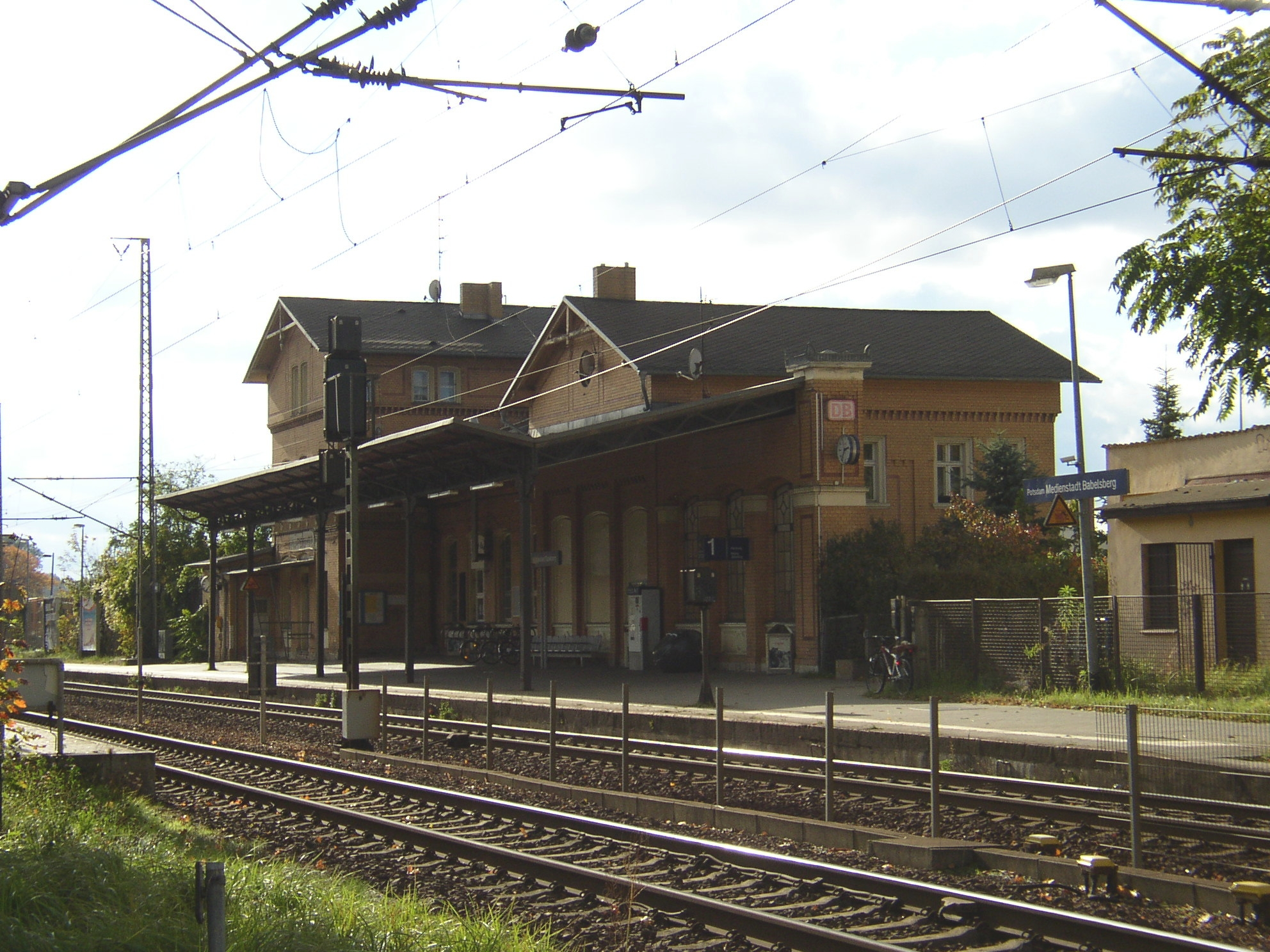 Bahnhof Potsdam, Medienstadt Babelsberg; ehemals Drewitz. Bahnsteigseite.